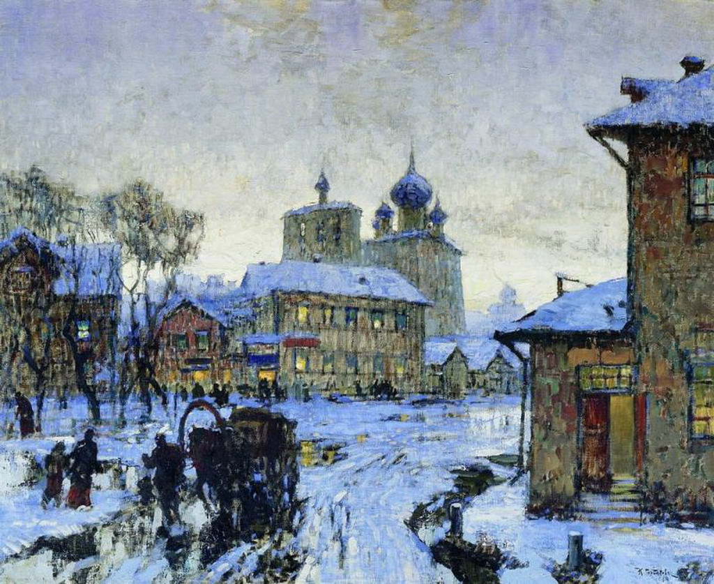 This is picture of russian painter Konstantin Gorbatov «Зимний вечер» (winter evening) Это картина русского художника Константина Горбатова «Зимний вечер»